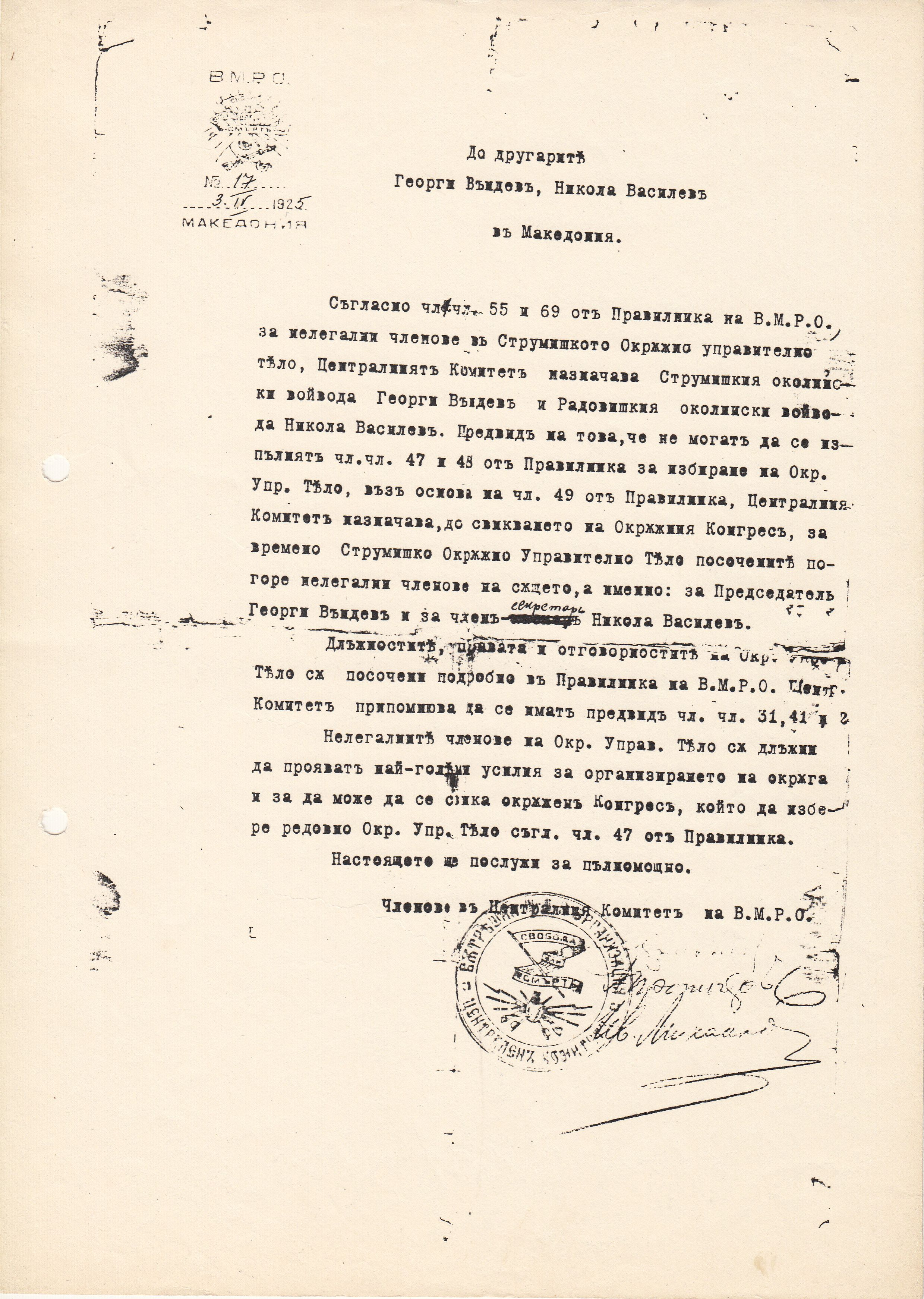 Заповед на ЦК на ВМОРО за назначаване на Георги Въндев и Никола Василев за членове на Струмишкото окръжно управително тяло и струмишки и радовишки войводи.